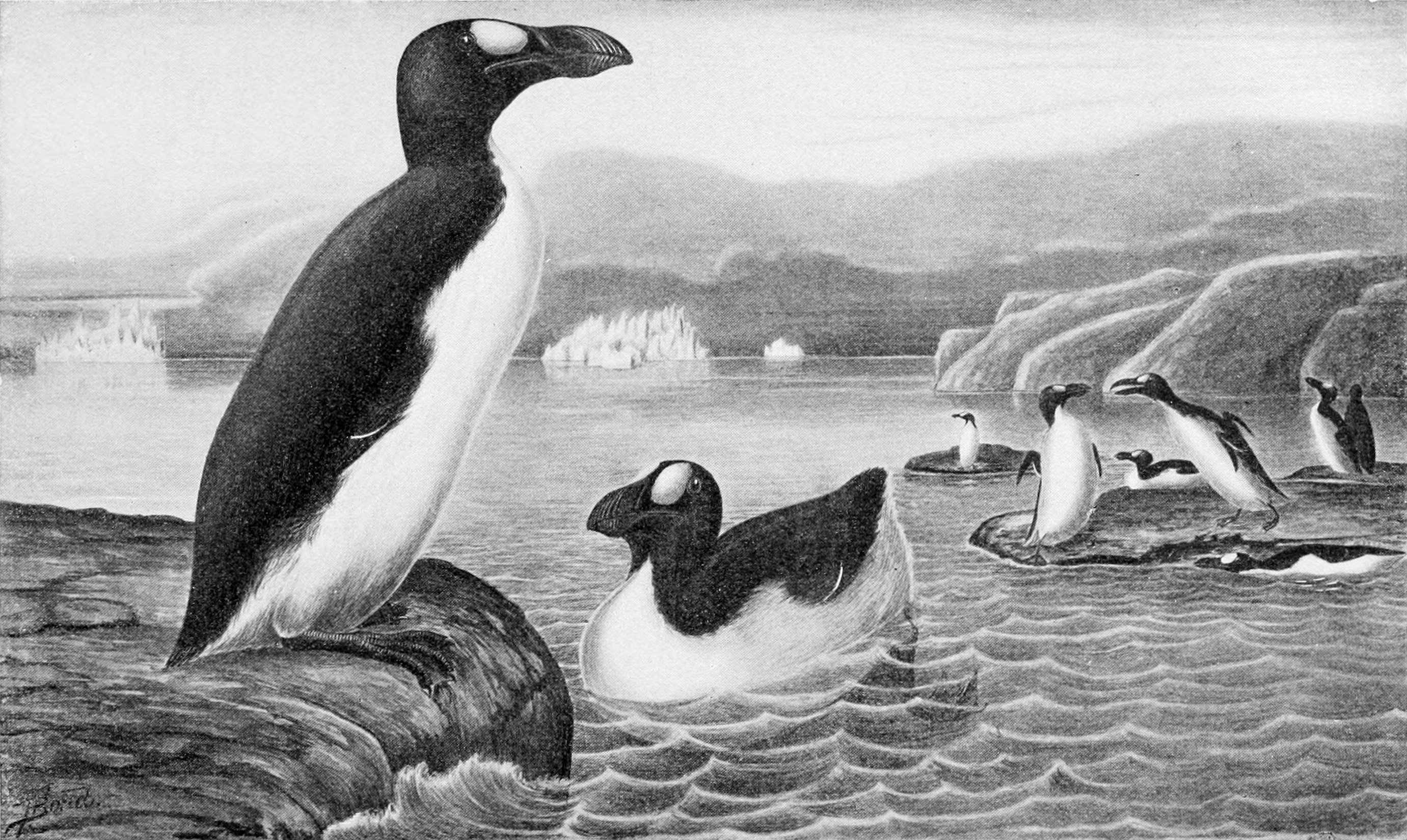 Grand pingouin